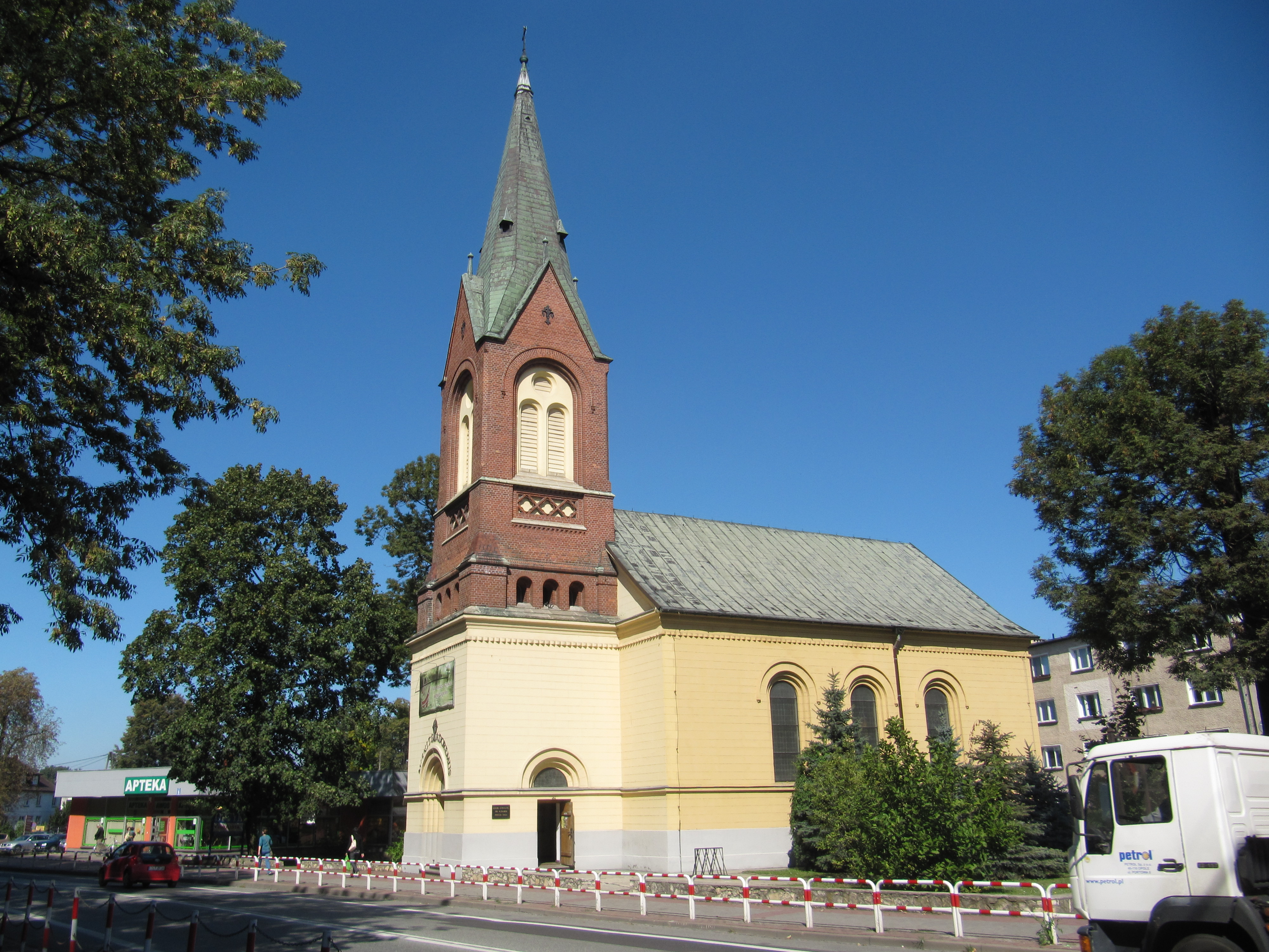 Strzelce Opolskie, kościół ewangelicki, ob. rzym.-kat. pw. Bożego Ciała, 1825, 1888